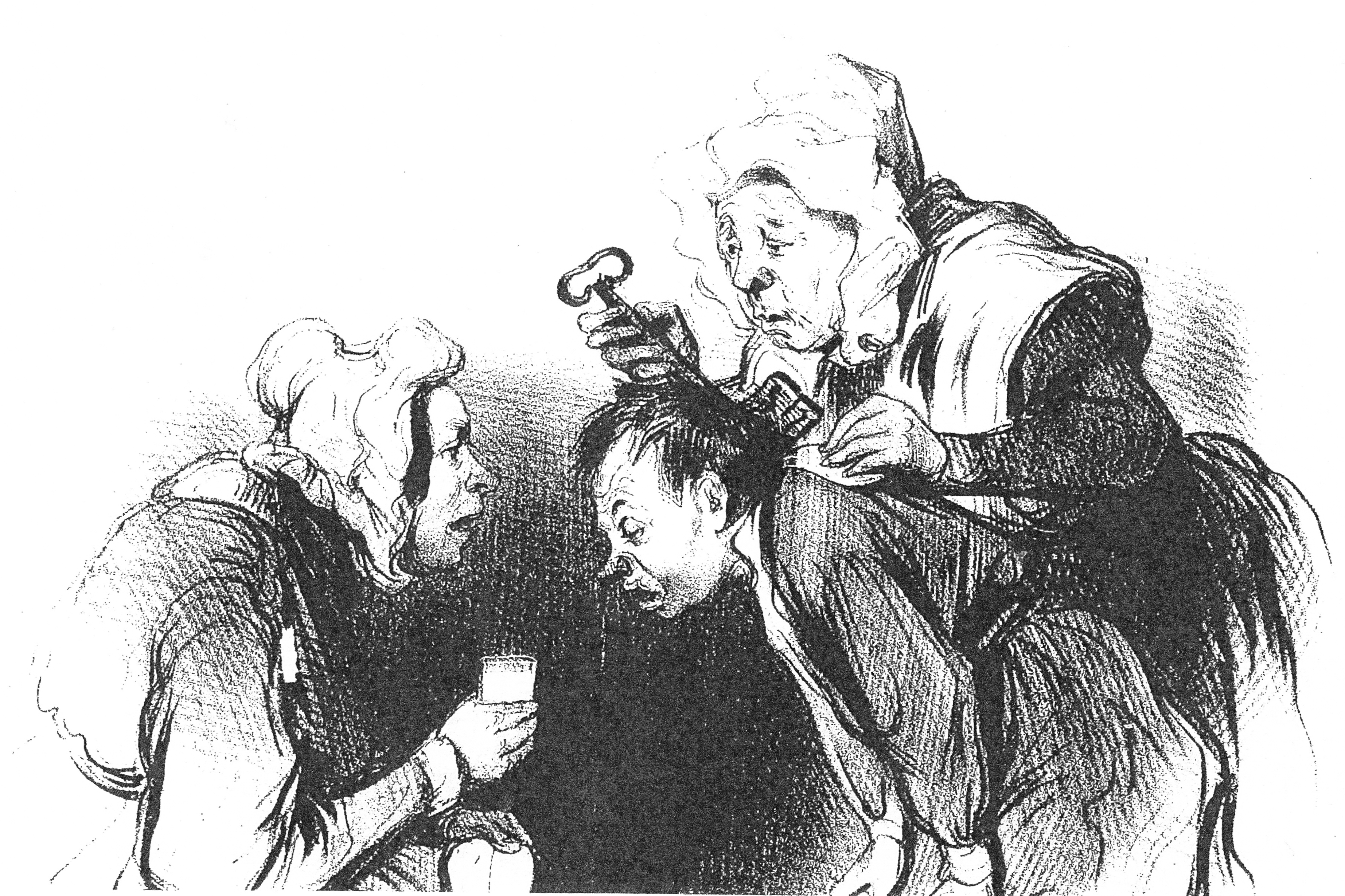 Honoré Daumier: Die guten Ratschläge (Der Versuch, durch Auflegen eines Schlüssels Nasenbluten zu stillen). Lithographie, Mitte 19. Jhdt.